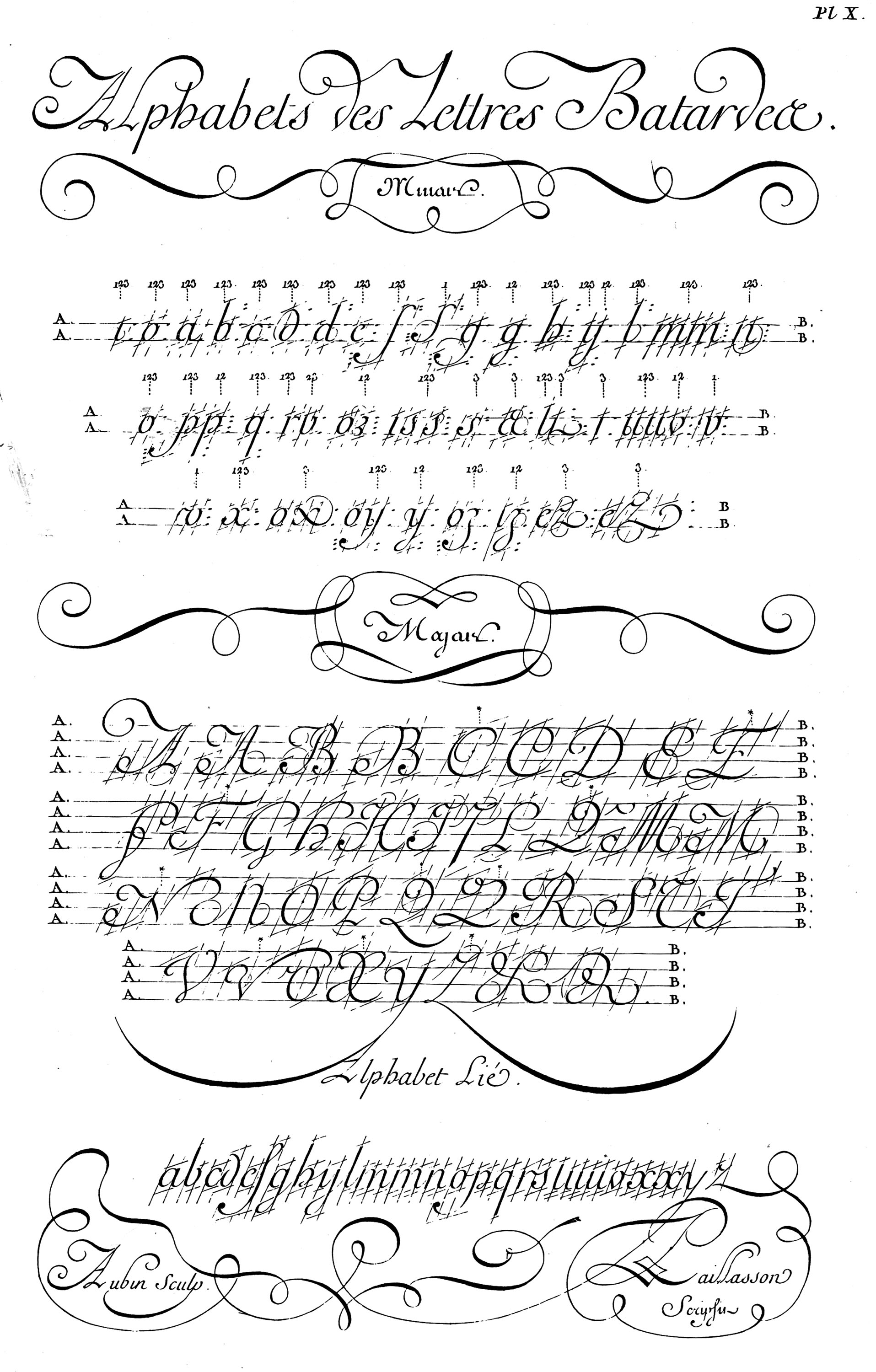 Spécimen d’écriture bâtarde, planche de l’Encyclopédie de Diderot et d'Alembert